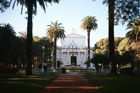 Imagen de la Iglesia mayor de San Pedro, provincia de Buenos Aires